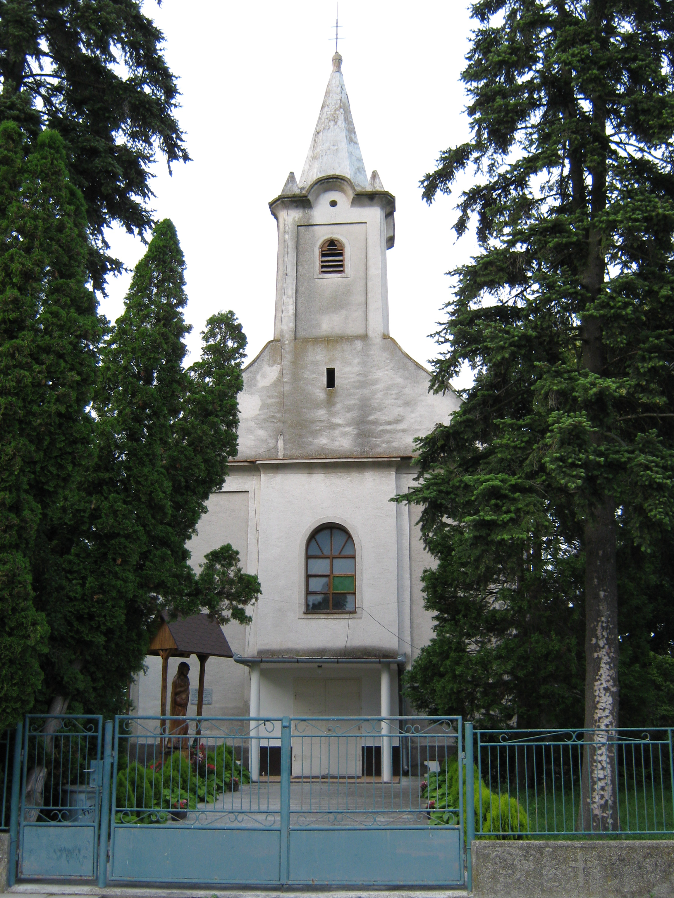 A medve, Szent Anna tiszteletére szentelt templom.